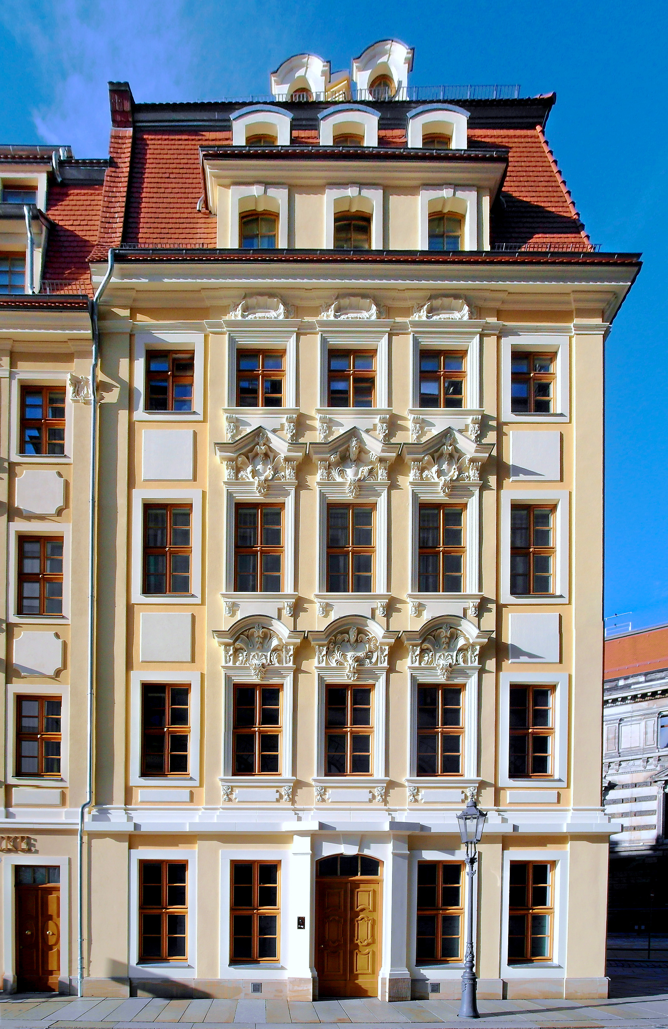 16.08.2014 Dresden Neumarkt: Eckhaus Rampische Str. 33, Südfassade (GMP: 51.051387,13.744094). [SAM5456-5457.JPG]20140816125MDR. JPG(c)Blobelt